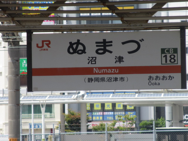 沼津駅(御殿場線)の駅名標（駅番号付き）